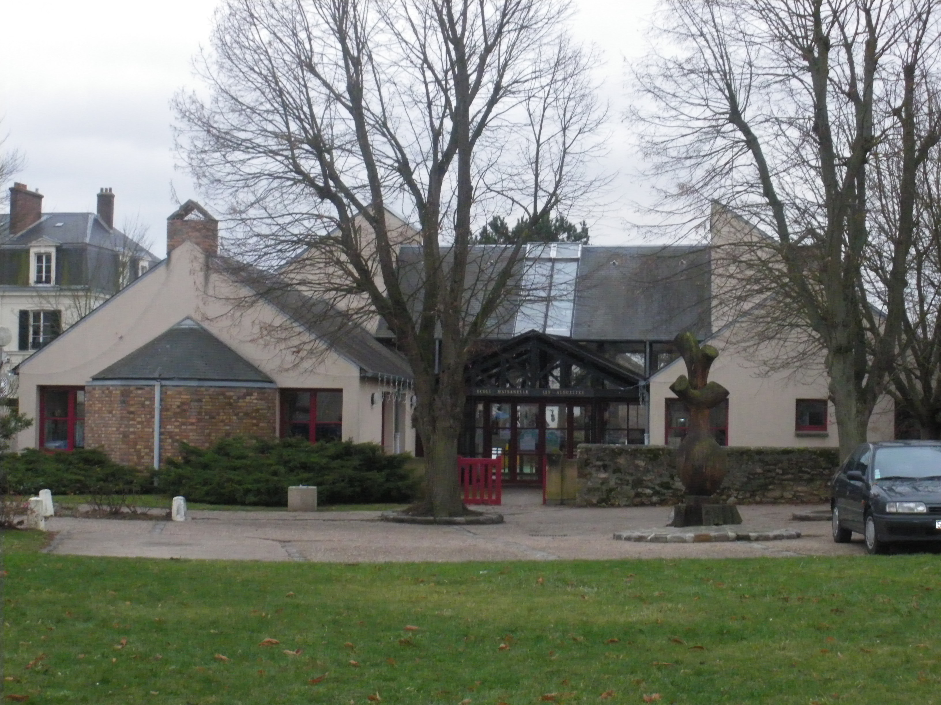 Ecole Maternelle de Saint Aubin, Essonne, France